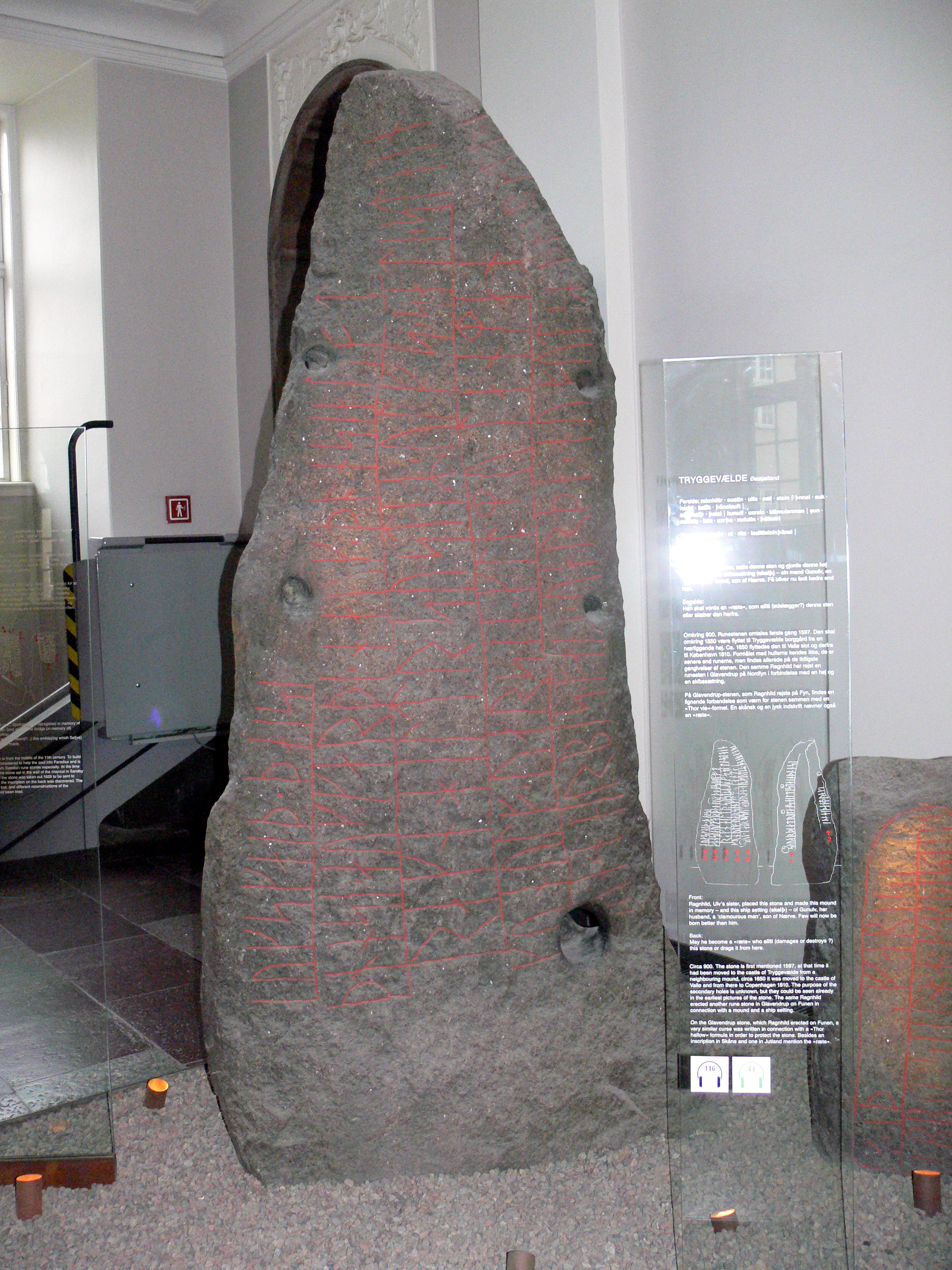 Runenstein von Tryggevælde (Sjælland) im Museum Kopenhagen. Inschrift: “Ragnhild, die Schwester Ulfs, setzte diesen Stein und erhöhte ihn und diese Schiffssetzung nach ihrem Mann Gunnulv, ein herrlicher Mann, Sohn des Narvi, wenige werden besser geboren als er.” Rückseite: “Der soll werden ein ‘ræte’, der diesen Stein beschädigt oder fortschleppt.”